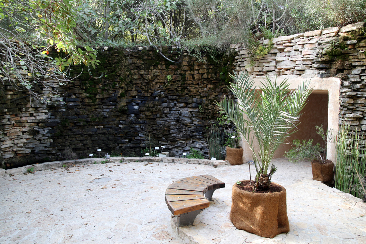 Jardin botanique à la Hebrew University de Jérusalem